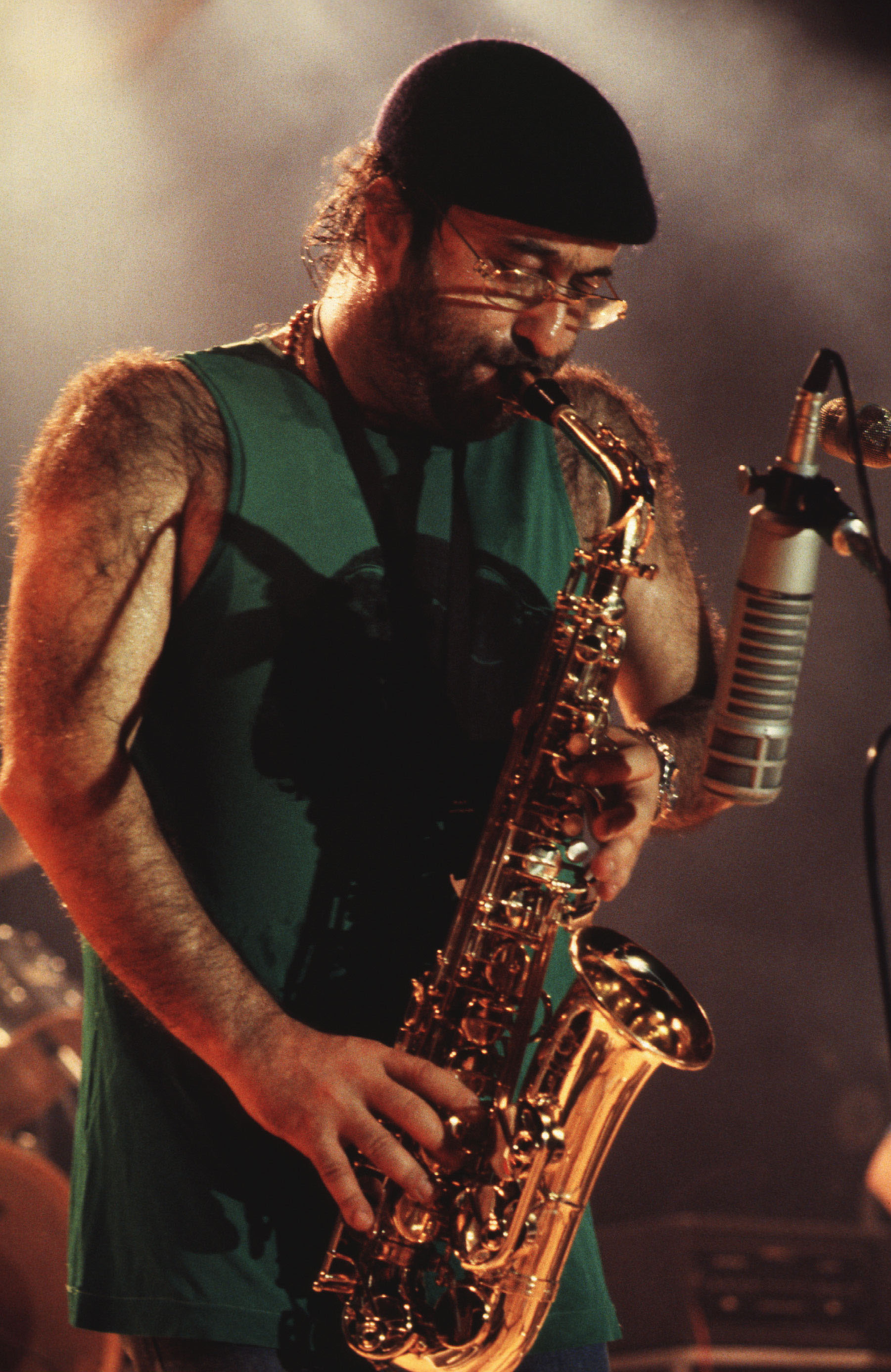 negli anni '80